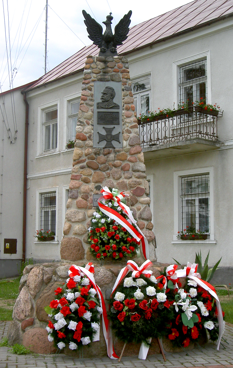 Biszcza, Poland • Centrum / Centre